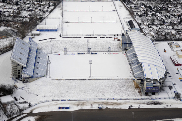 Poznań - stadion miejski zima 2009